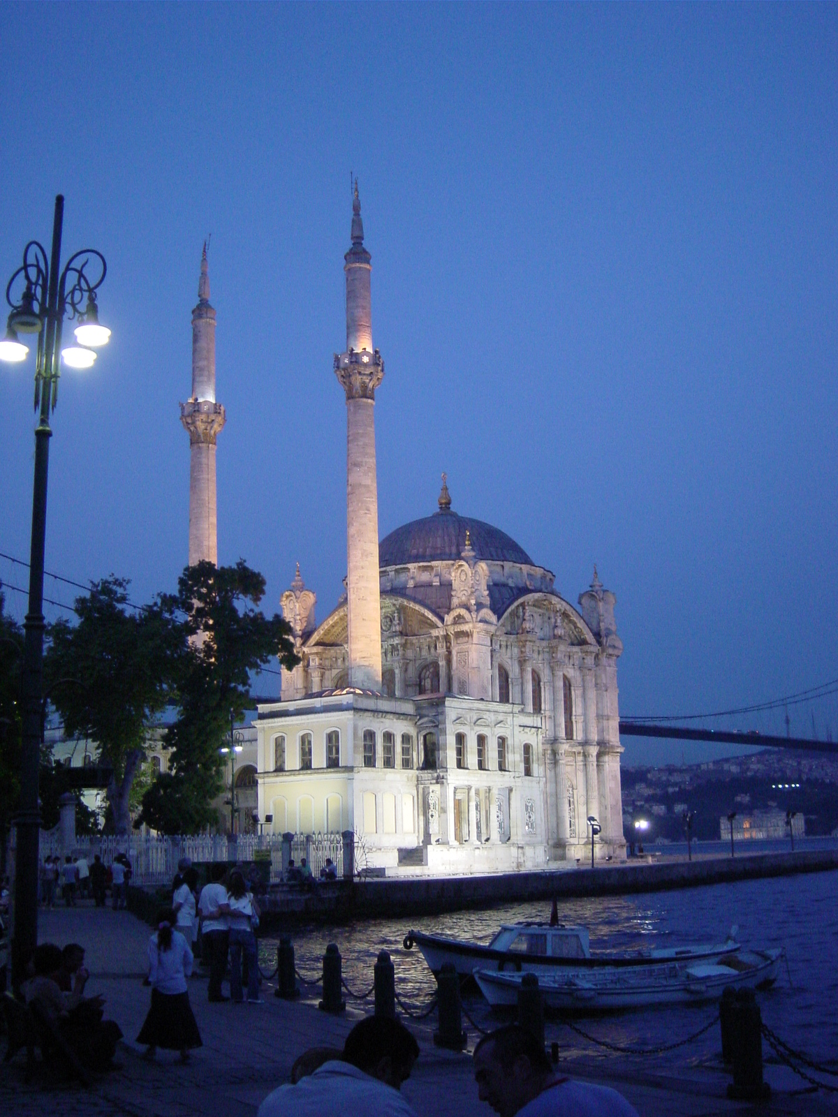 Esterno della moschea di Ortaköy, a poca distanza da Istanbul, capolavoro dello stile soprannominato "barocco" dell'architettura ottomana. Foto di: Giovanni Dall'Orto, 30-5-2006.